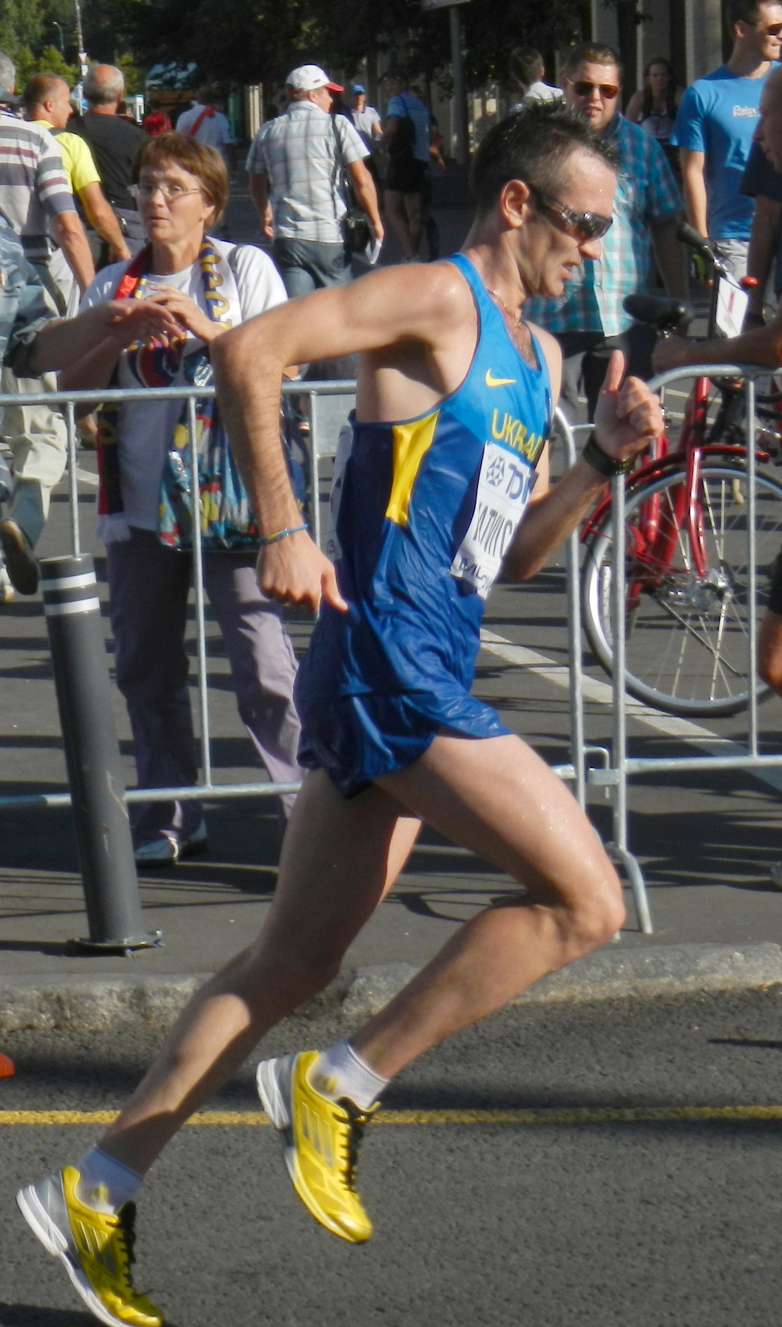 42 (1097) Vasil Matviychuk (Василий Матвийчук) (Ukraine) 2:26:21